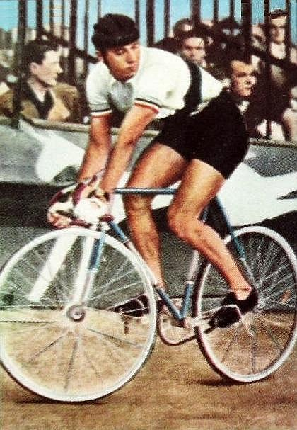 Daniel Morelon en 1969 - PANINI 1969/1970, n°224